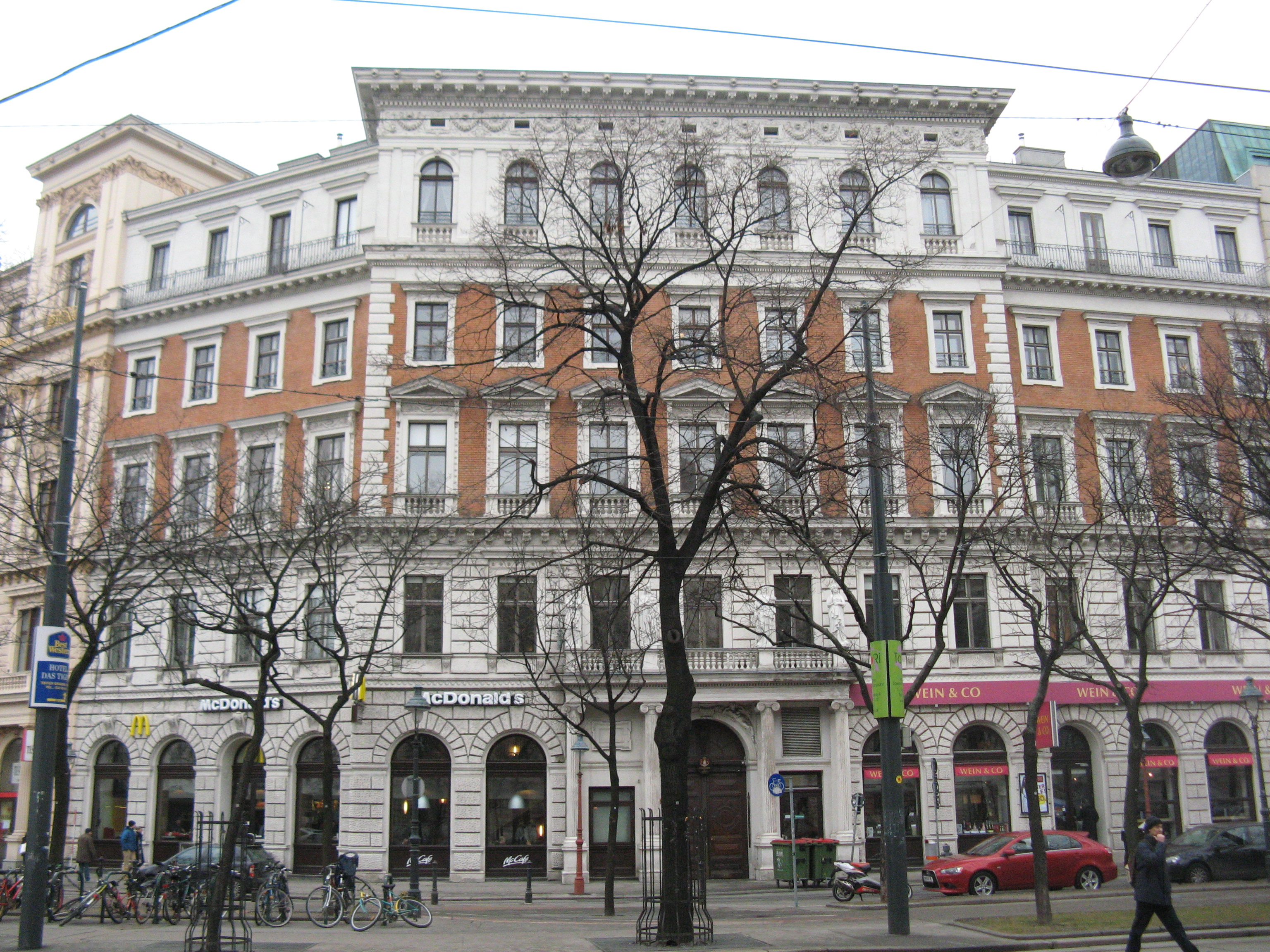 Haus Dr.-Karl-Lueger-Ring 12 (1869-1872) von Emil von Förster, Wien-Innere Stadt